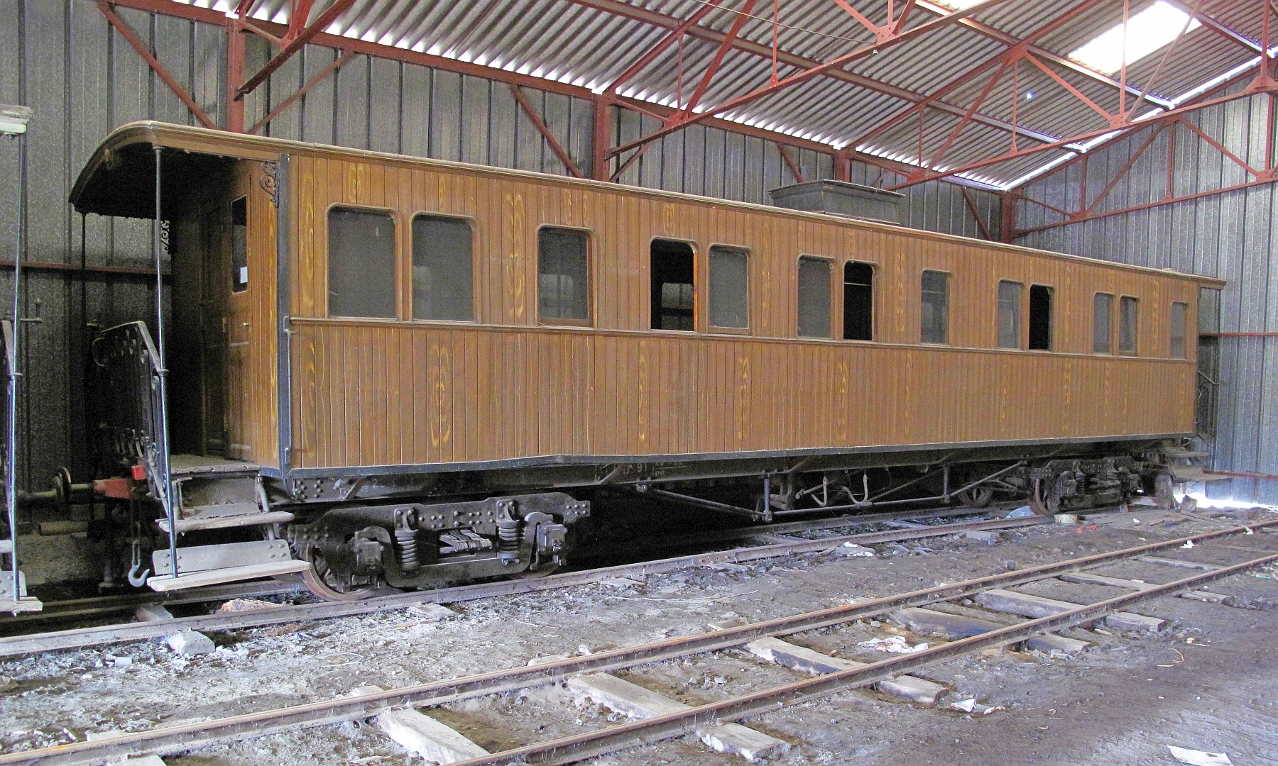 La voiture ABD 91 ex-Réseau Breton garée à Tence le 20 mai 2011.